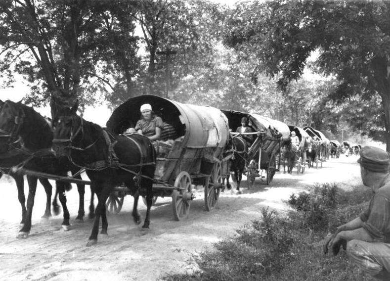 Flüchtlingstreck in Richtung Deutschland ADN-ZB/Archiv II. Weltkrieg 1939 - 1945 Ungarn 1944: In langen Trecks fahren Pferdefuhrwerke der sogenannten Schwarzmeerdeutschen in Richtung Deutschland. (Aufn.: Juli 1944/Dissmann) 640-44